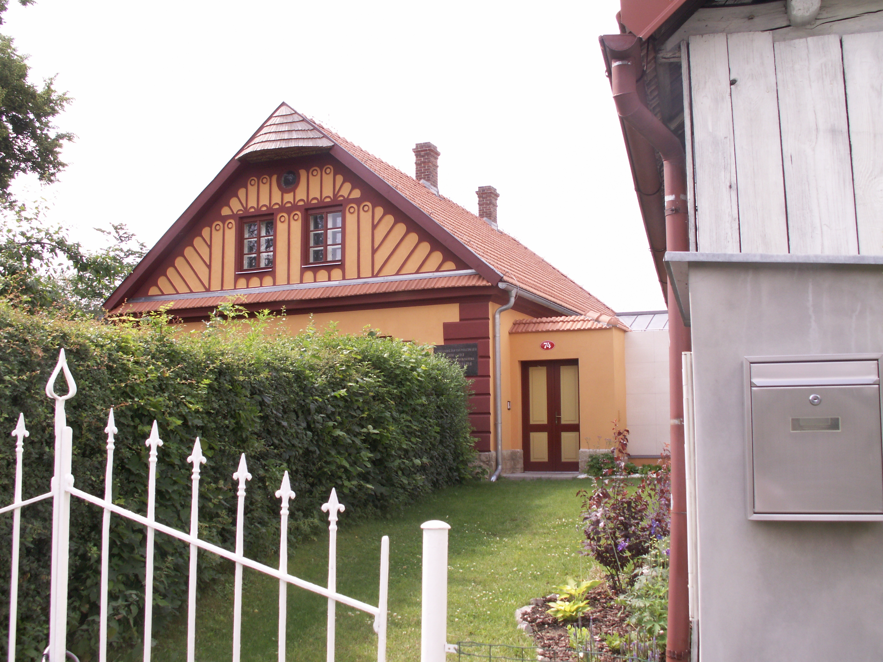 Terézy Novákové 74, Proseč.